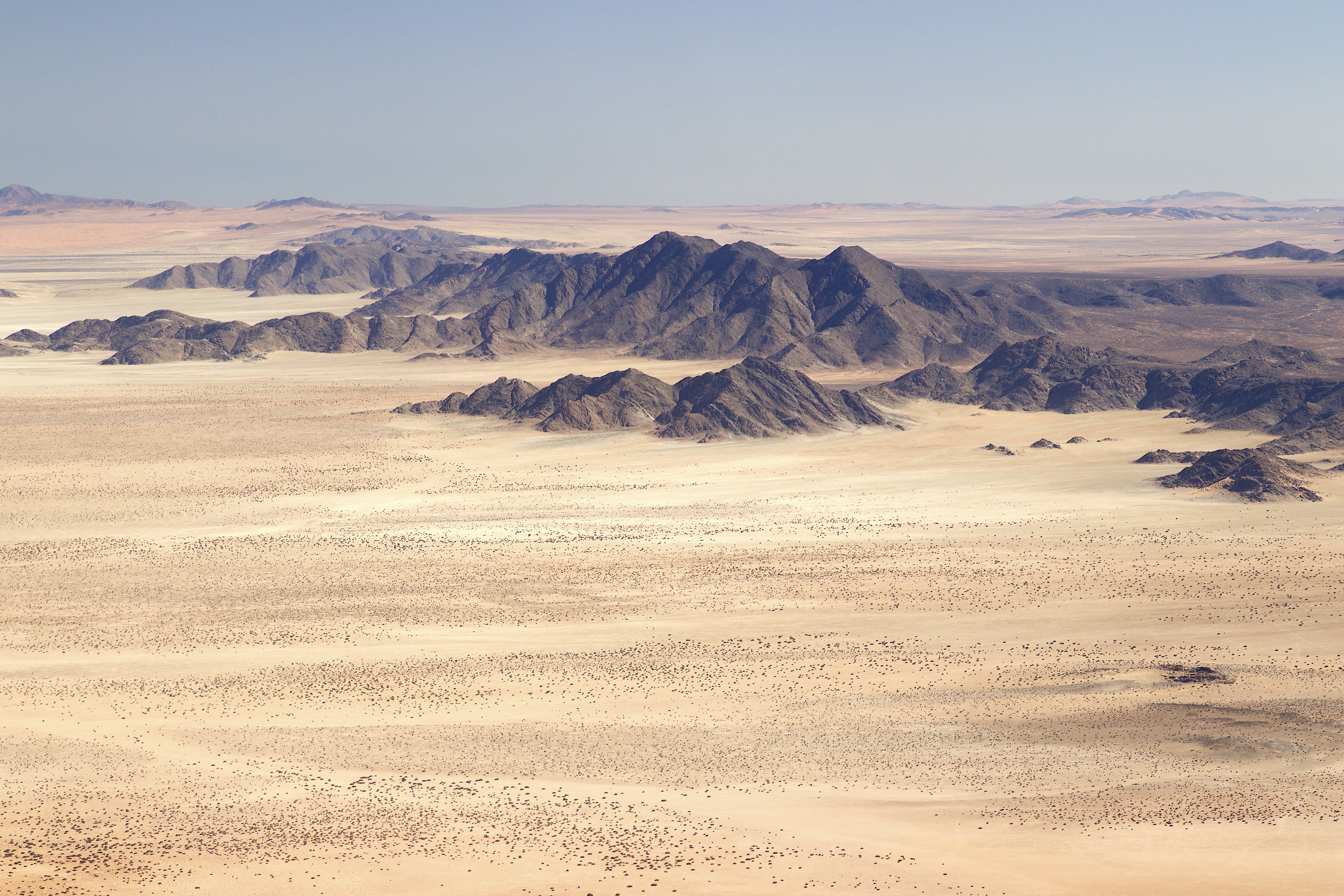 Aurusberg Luftaufnahme 2018